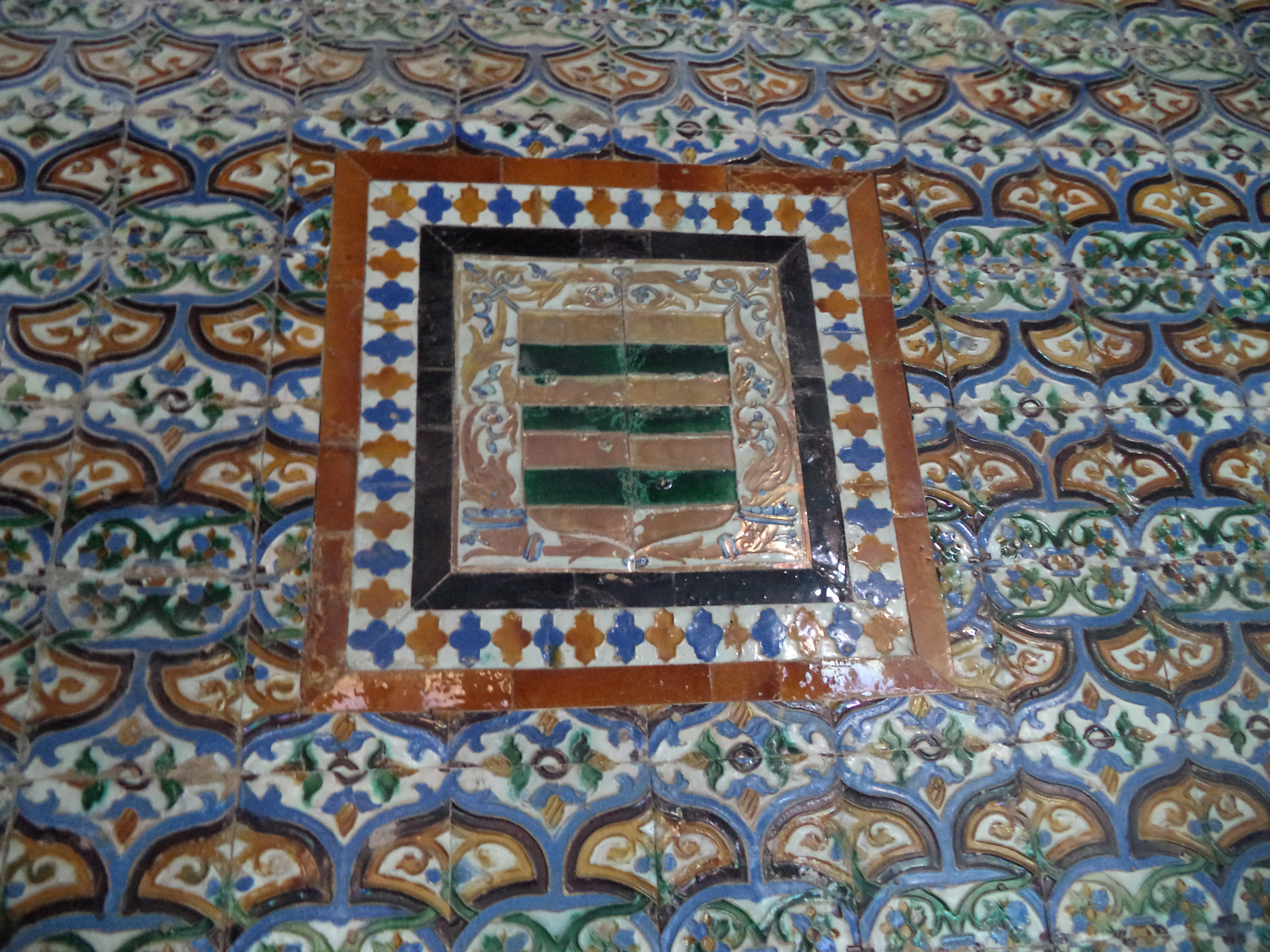 Escudo de la Casa de Ribera en azulejos en una pared de la Casa de Pilatos en Sevilla